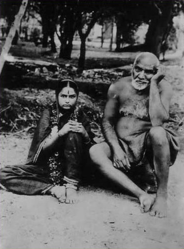 Upasni Maharaj and Godavari Ma